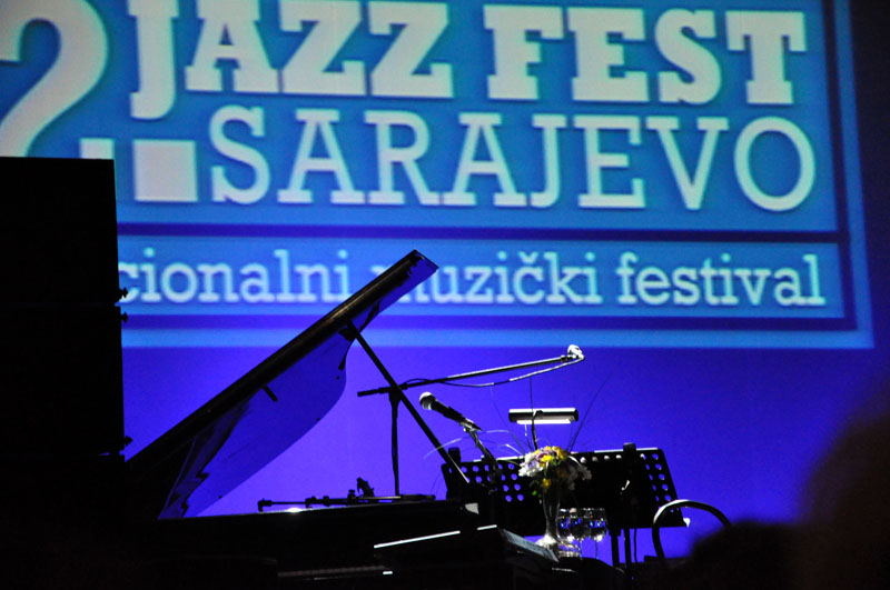 12. Jazz Fest Sarajevo 2008